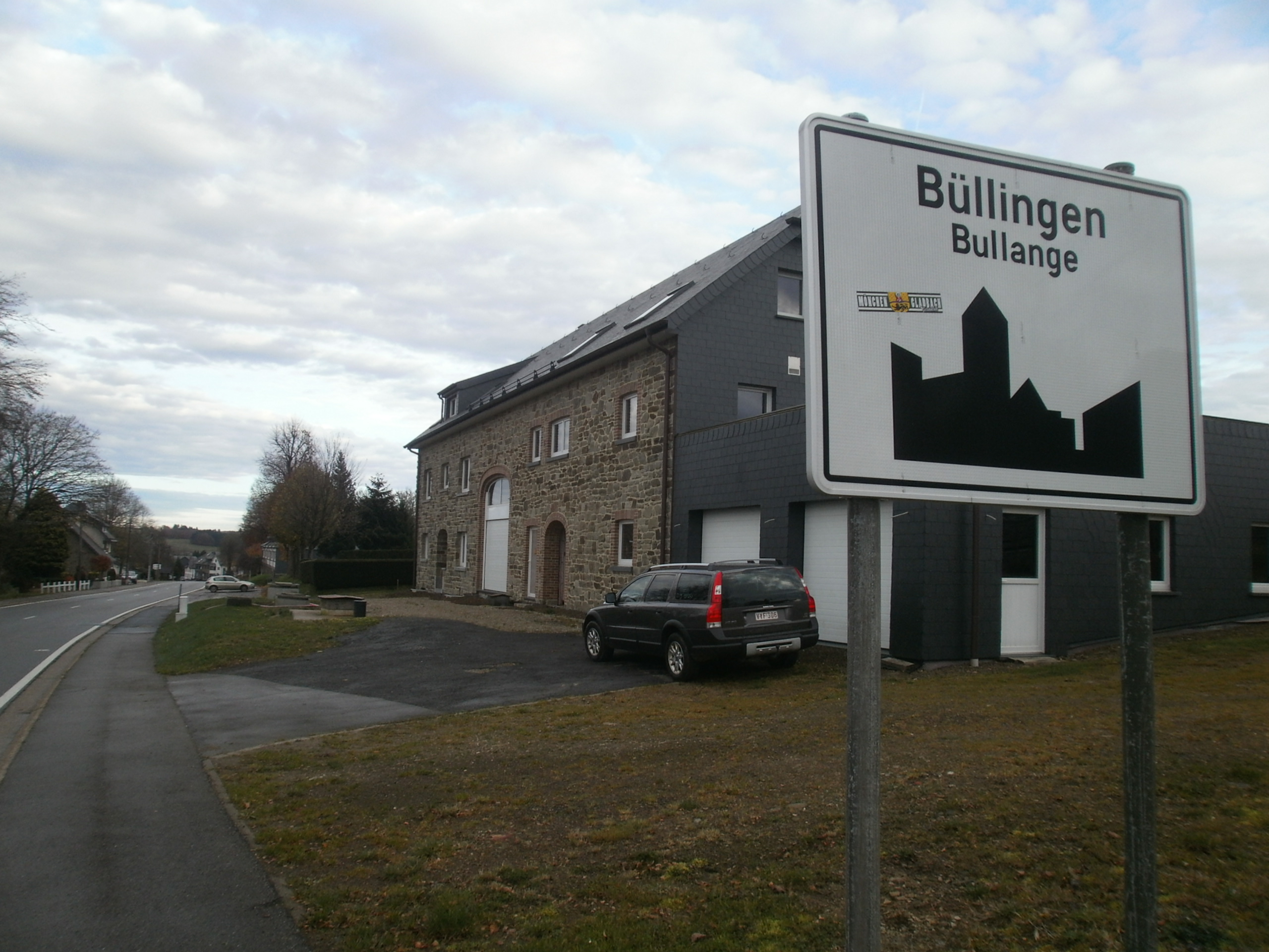 Linnakese piirisilt Morshecki tänaval, nov. 2014.